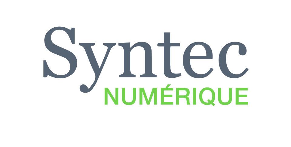 Logo du syndicat professionnel Syntec Numérique